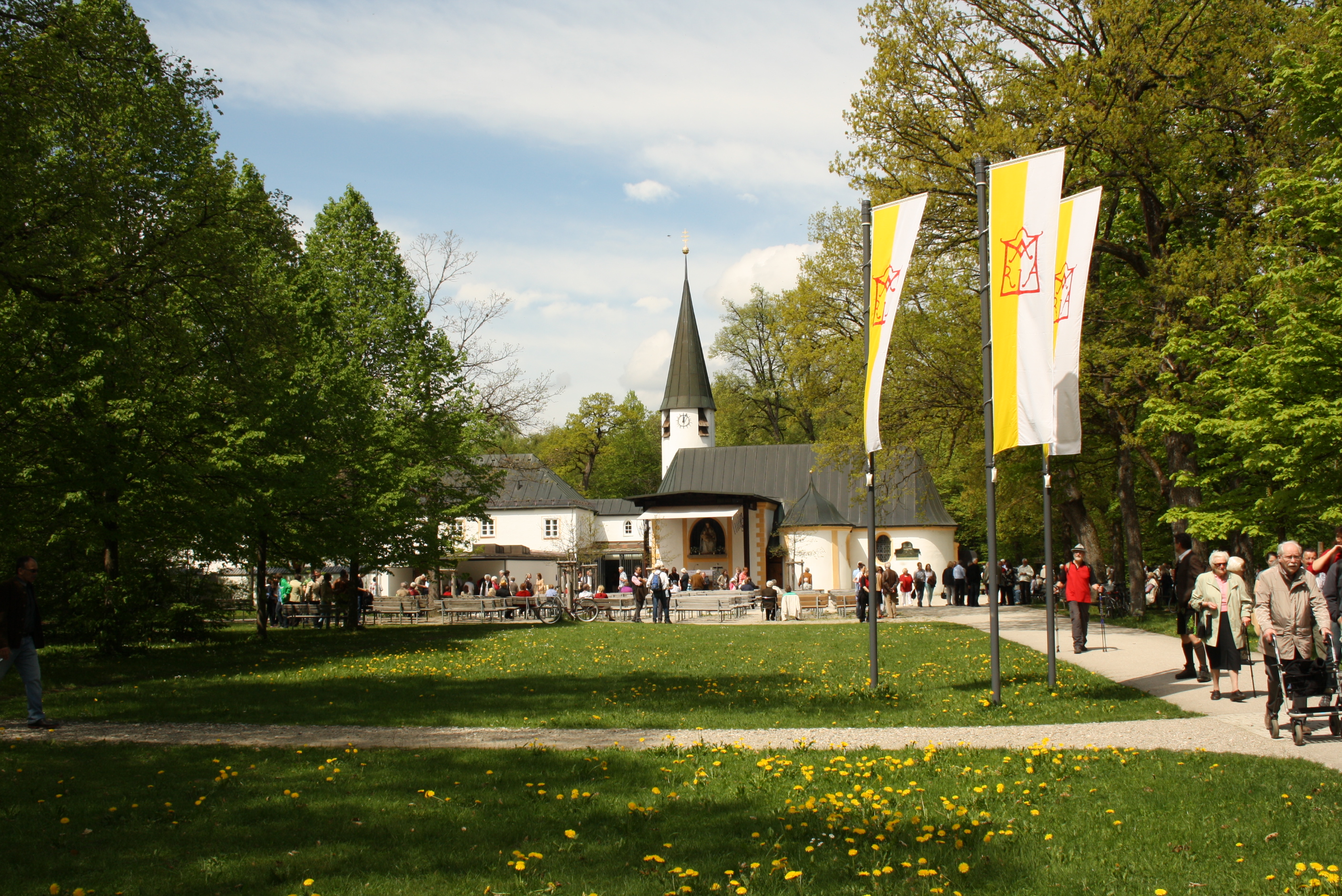 Blick auf Maria Eich / Planegg mit Freialtar